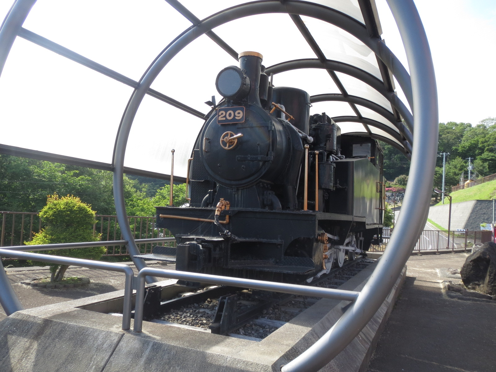 C1 20型蒸気機関車 Canon IXY 3